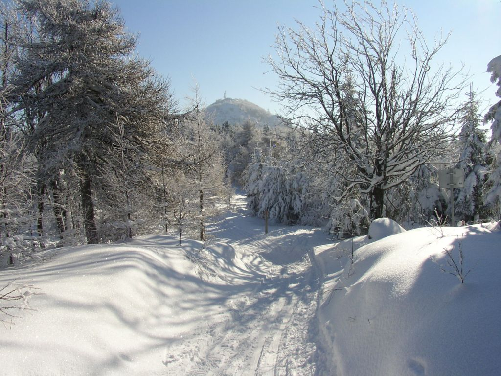 Vrchol Luže v zimě, česko-německá hranice